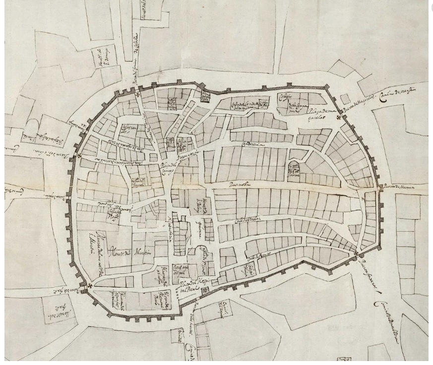 Plano de Santiago de Compostela de 1595 que indica las murallas de la ciudad.